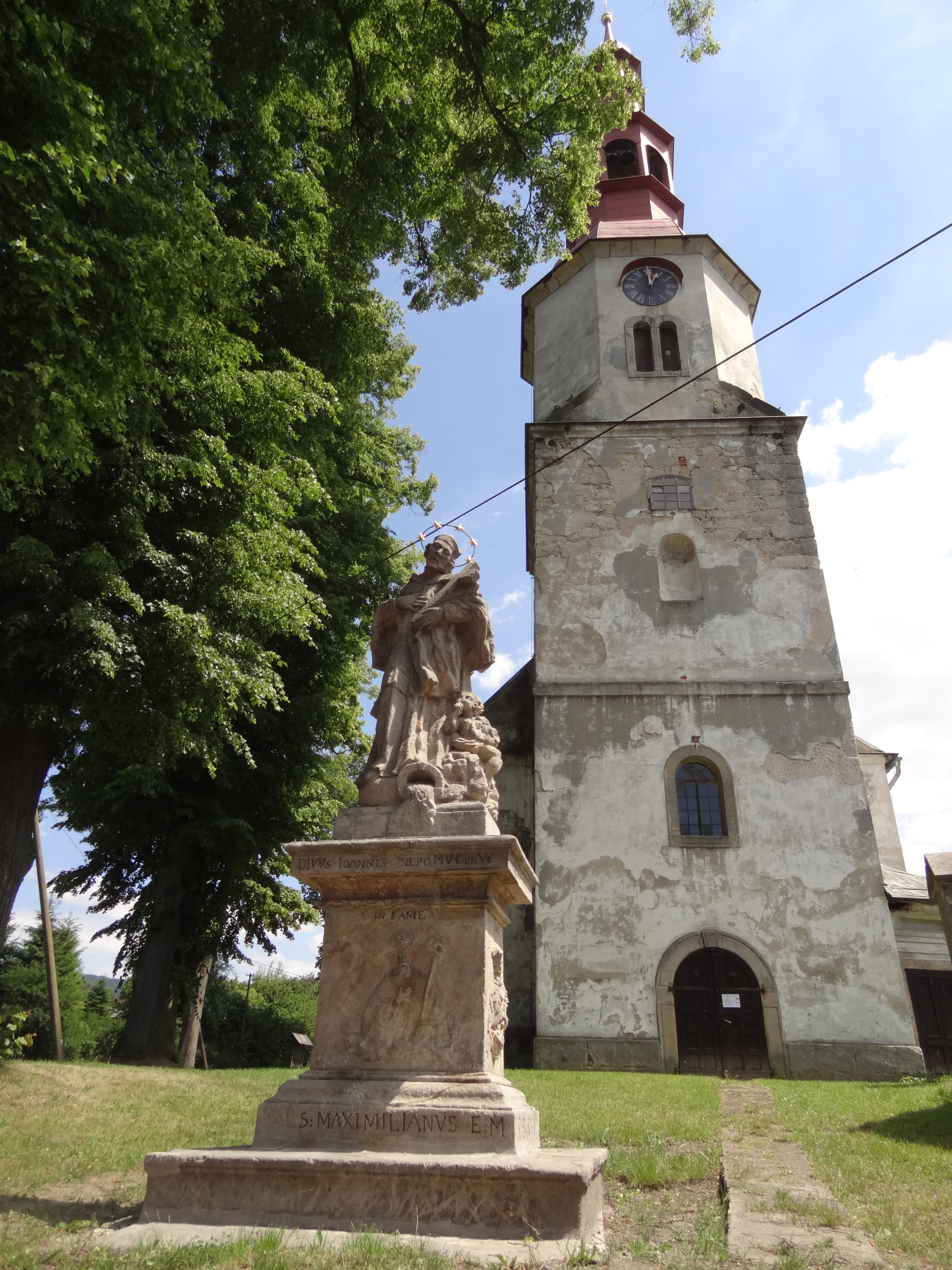 Socha svatého Jana Nepomuckého, před západním průčelím kostela, Křižany.